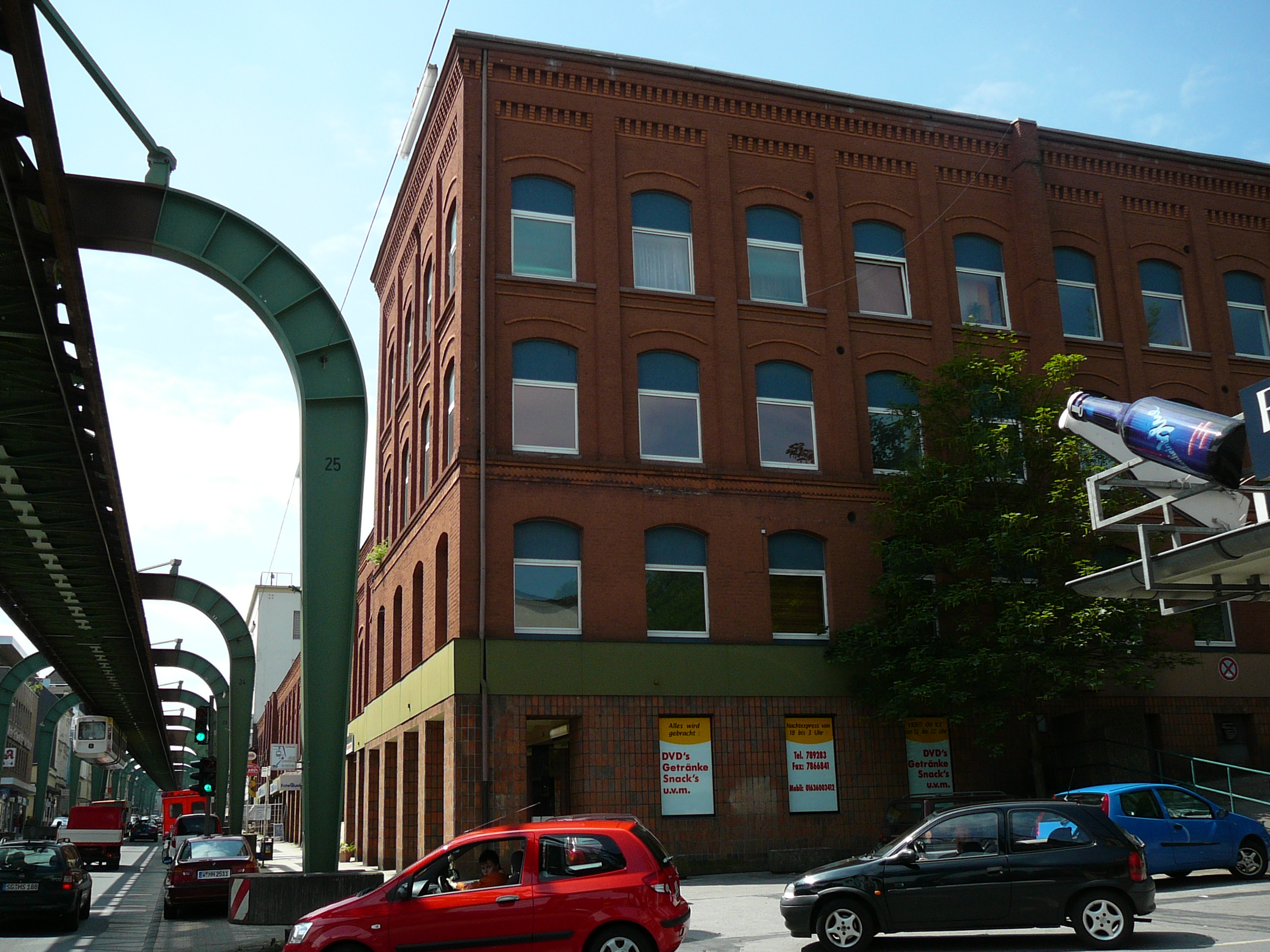 Gebhardgebäude, Kaiserstraße, Wuppertal